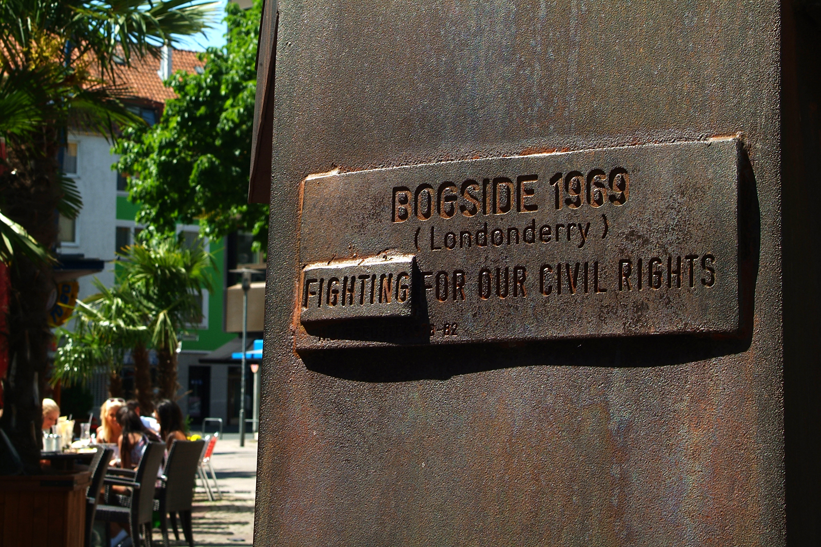 "Bogside 1969 (Londonderry) - Fighting for our Civil Rights" titulierte "H. J. Breuste" seine 1978-82 errichtete Skulptur in der Osterstraße in Hannover, die anläßlich des 20jährigen Gründungsjubiläums von Amnesty International aufgestellt wurde.